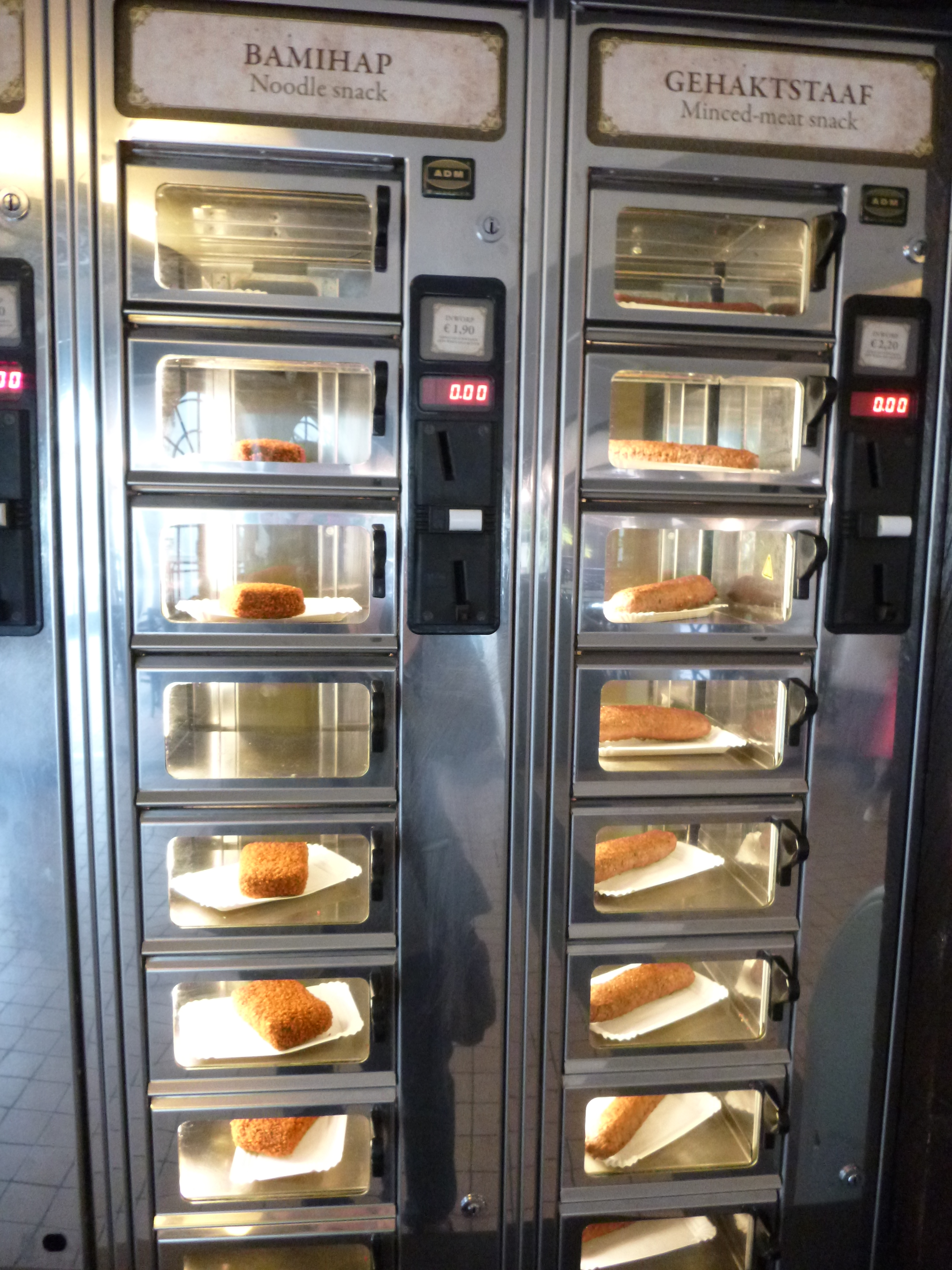 Distributeur automatique snacks chauds à Efteling